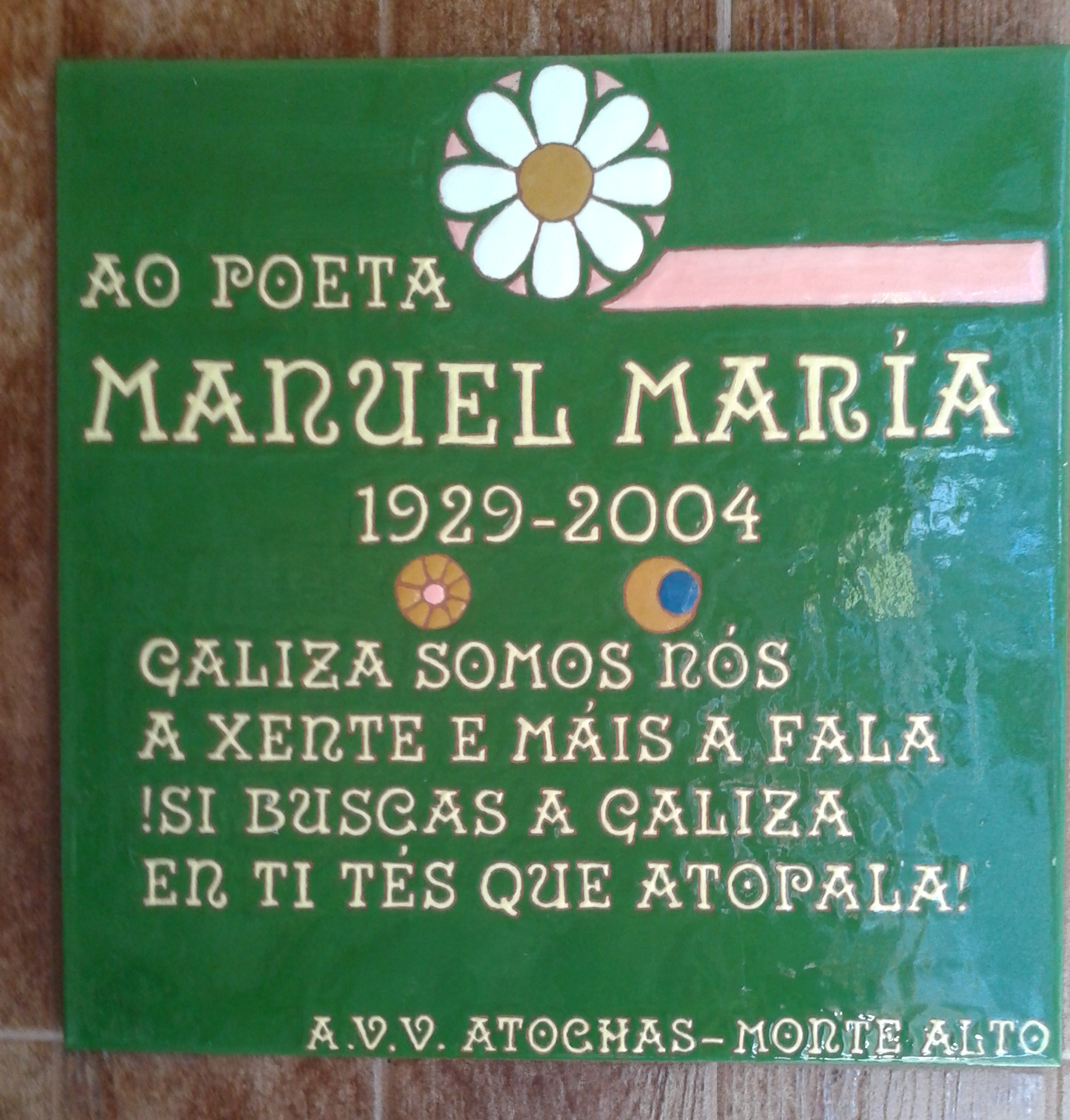 Placa en homenaxe a Manuel María na súa casa da Coruña